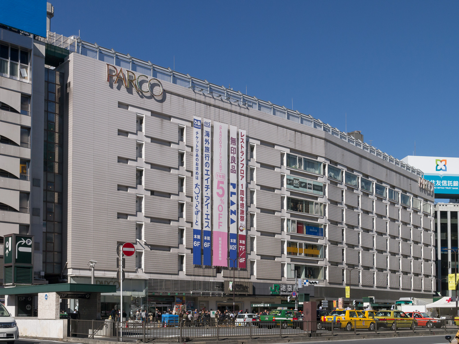 池袋パルコ、池袋駅、東京都豊島区池袋。